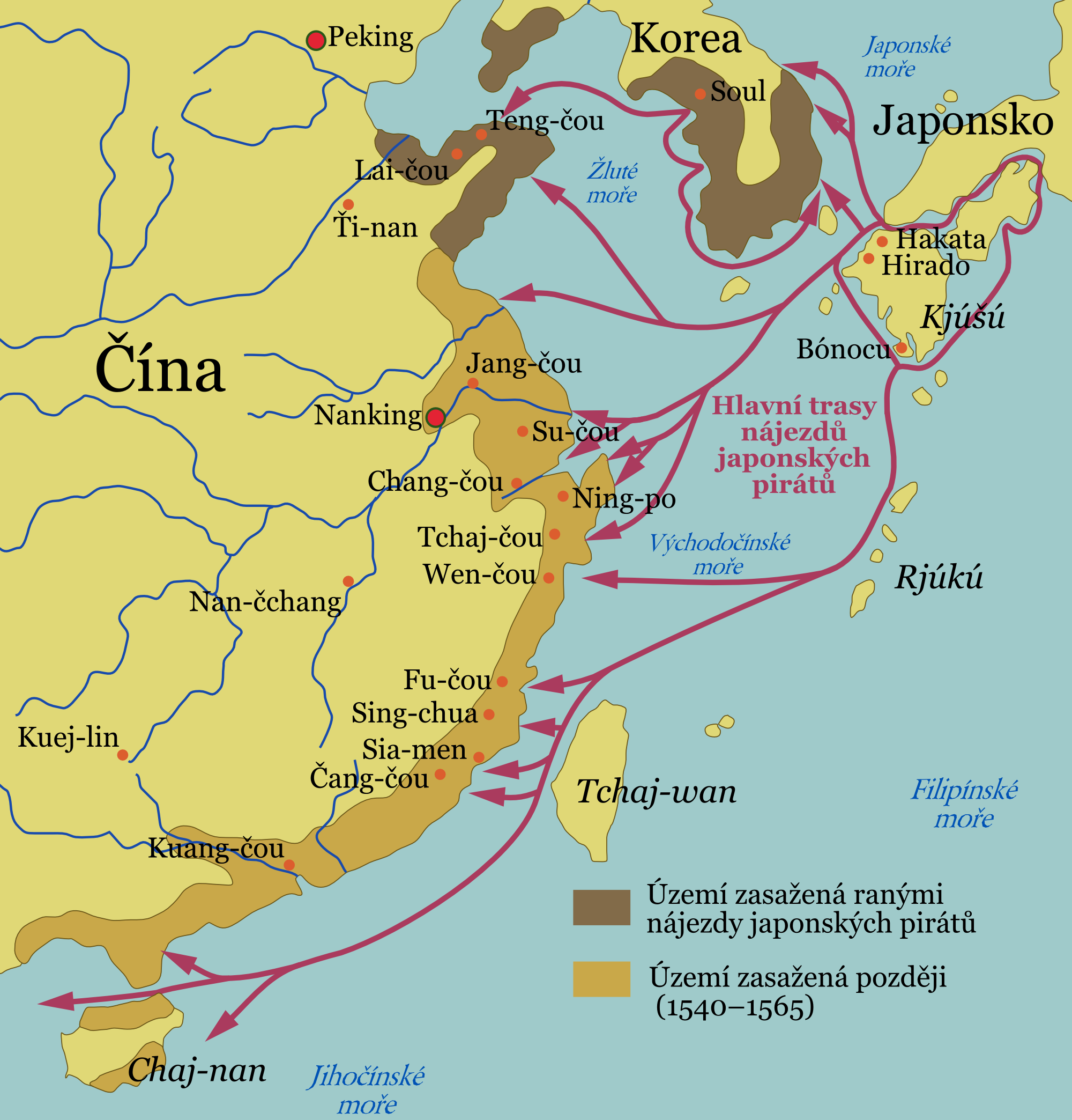 Nájezdy japonských pirátů (wakó) na Čínu a Koreu v 16. století za dob dynastie Ming. Založeno na tomto obrázku, který byl vytvořen podle mapy č. 23 z: The Cambridge History of China, Vol. 7: The Ming Dynasty 1368-1644, Part I (Cambridge University Press: 1988)